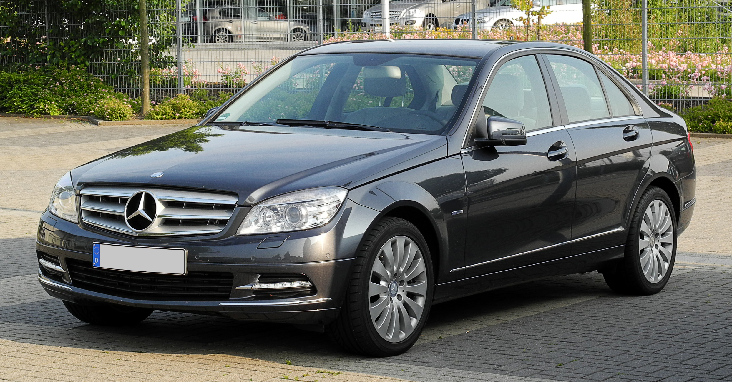 Mercedes-Benz C 350 CDI BlueEFFICIENCY Elegance (W 204)